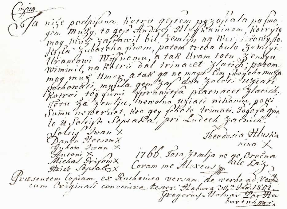 Jedna z písomností v rusínskom nárečí z roku 1801 opis: Prvá rusínska písomná zmienka zdroj: Habura v rokoch 1818 - 1993